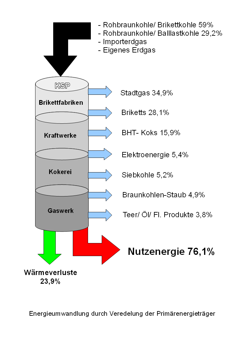 Energieumwandlung im Gaskombinat Schwarze Pumpe (bis 1989)